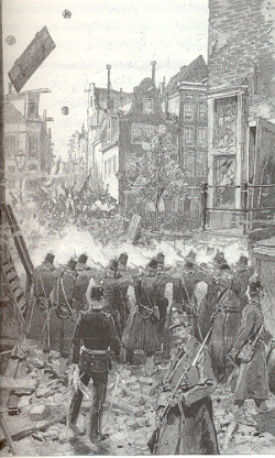 palingoproer